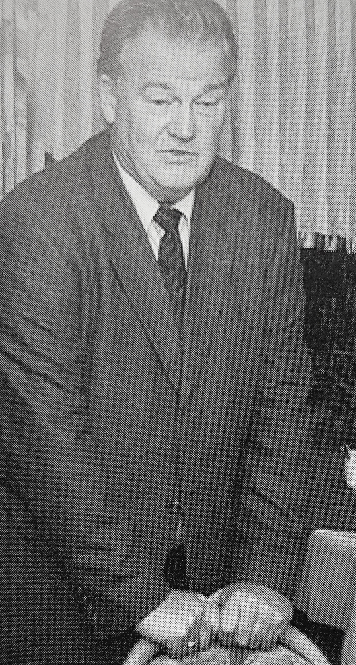 Gerhard Waibel flygplanskonstruktör